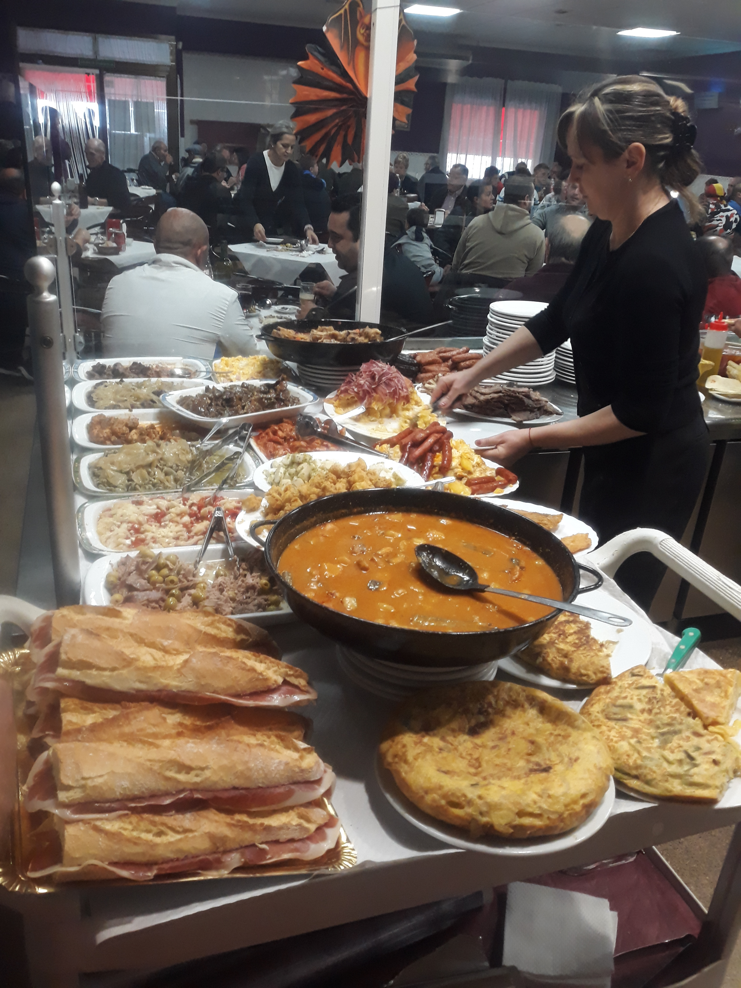 Esmorzar valencià